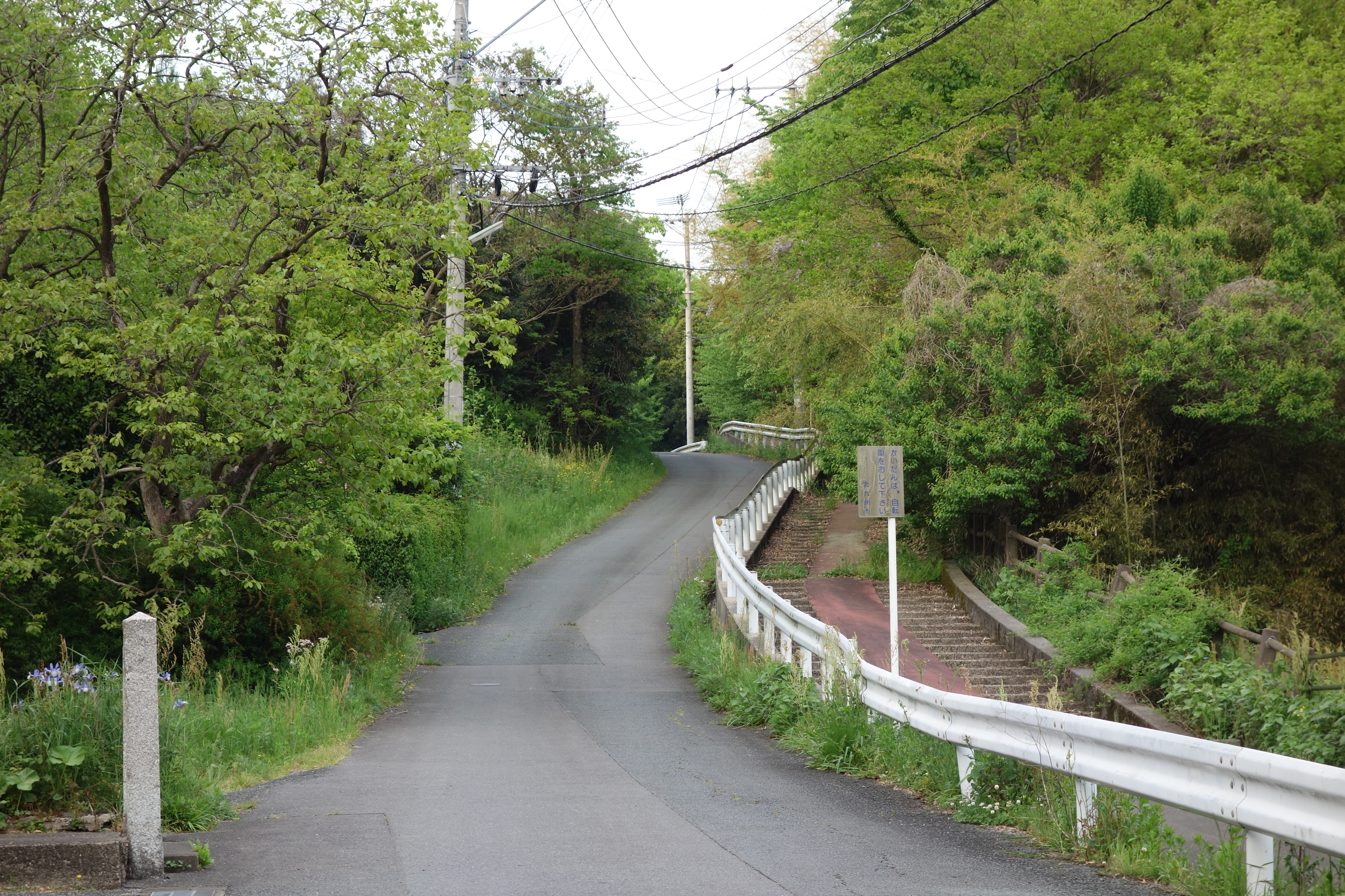 市道との並走区間